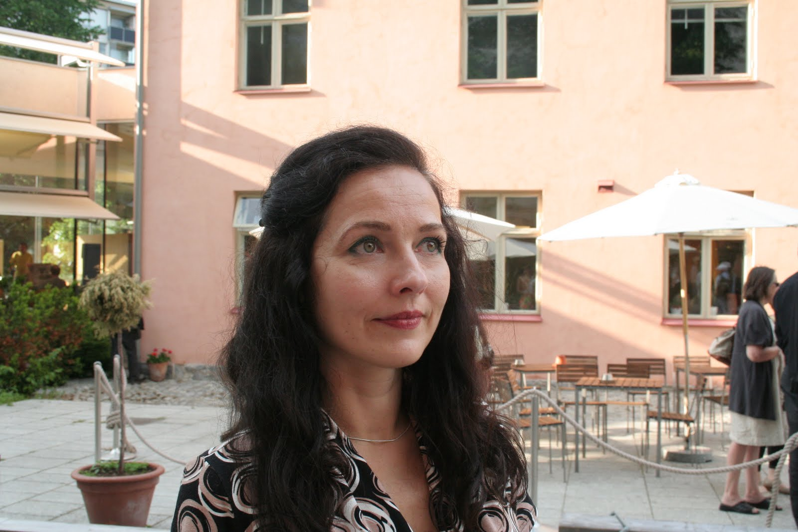 Elo Viiding Turus (Soomes) Littera Baltica festivali raames.